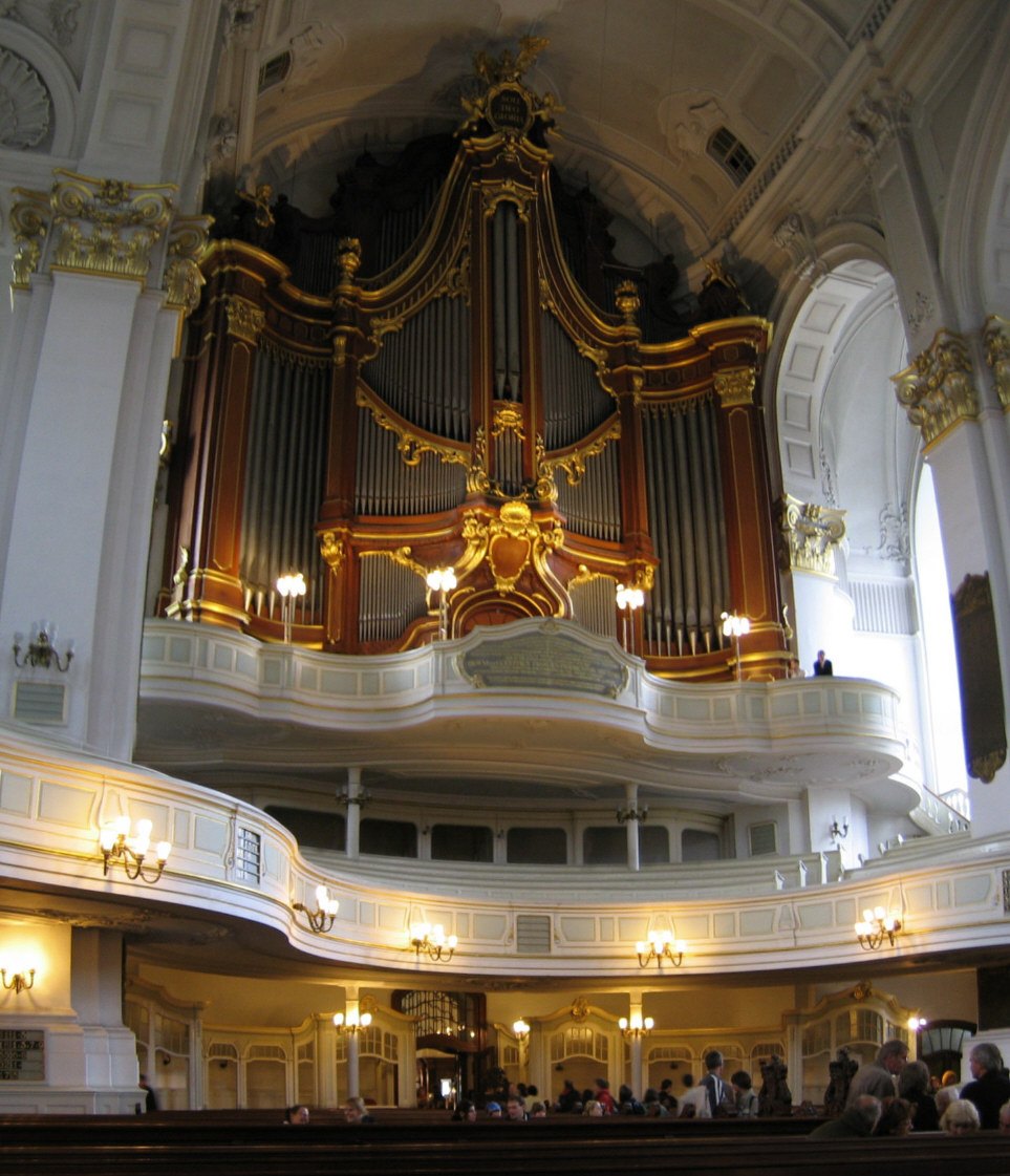 Innenaufnahme St. Michaelis ("Michel") in Hamburg (Orgel).